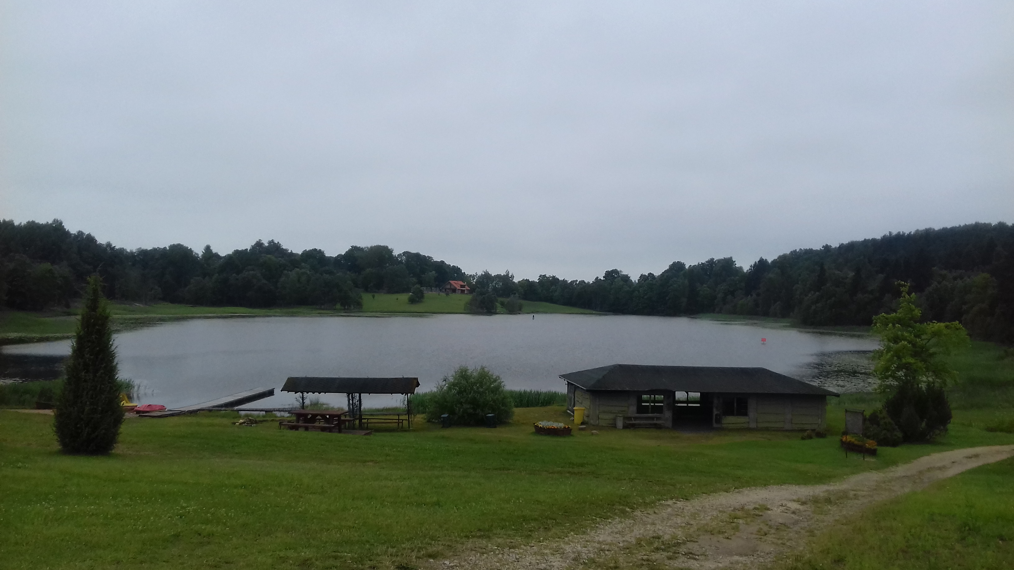 Salājs on järv Vestiena vallas